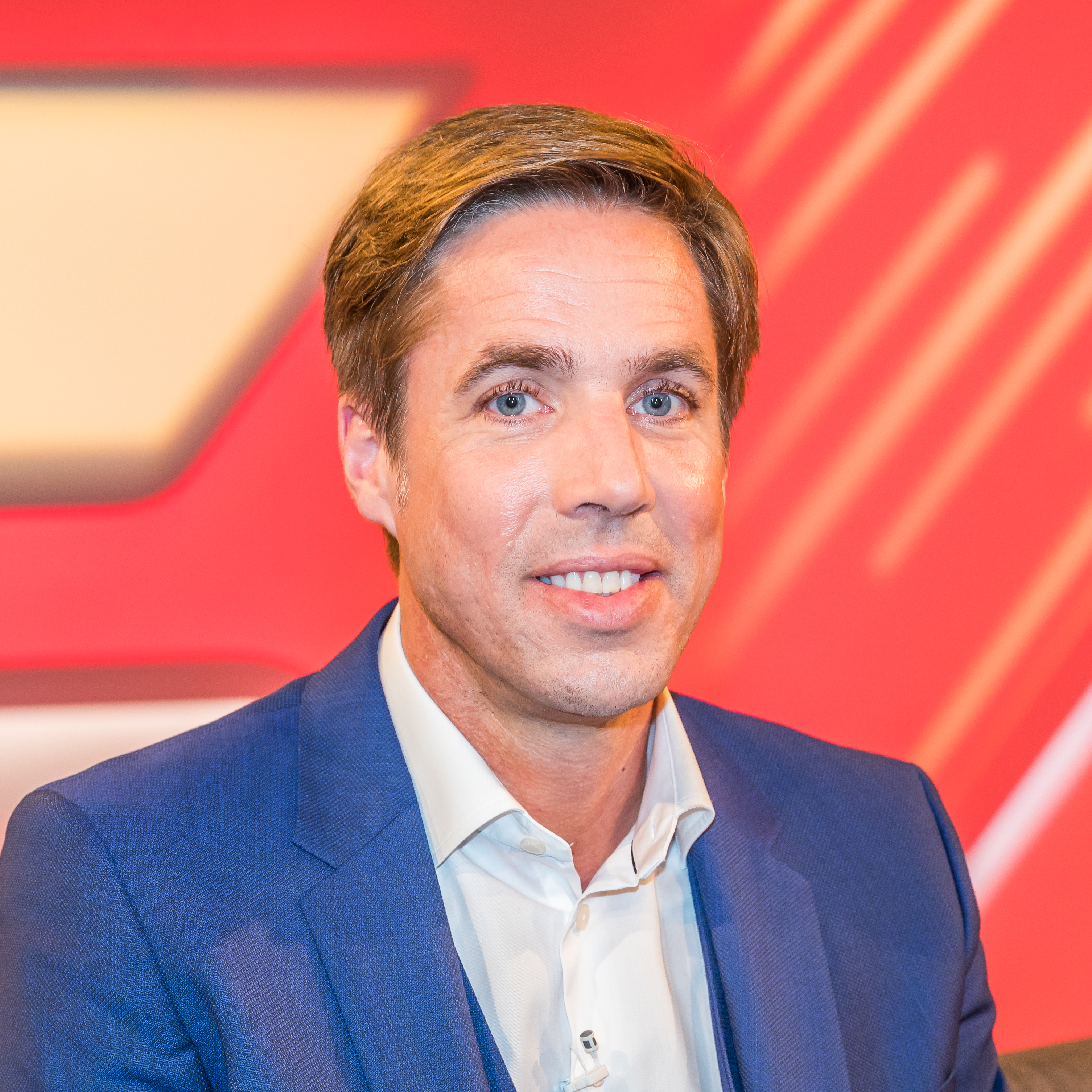 MAISCHBERGER am 17. Oktober 2018 in Köln. Produziert vom WDR. Thema der Sendung: „Watschn für die Volksparteien: Wer braucht noch Union und SPD?“ Foto: Markus Feldenkirchen („Spiegel“-Journalist)